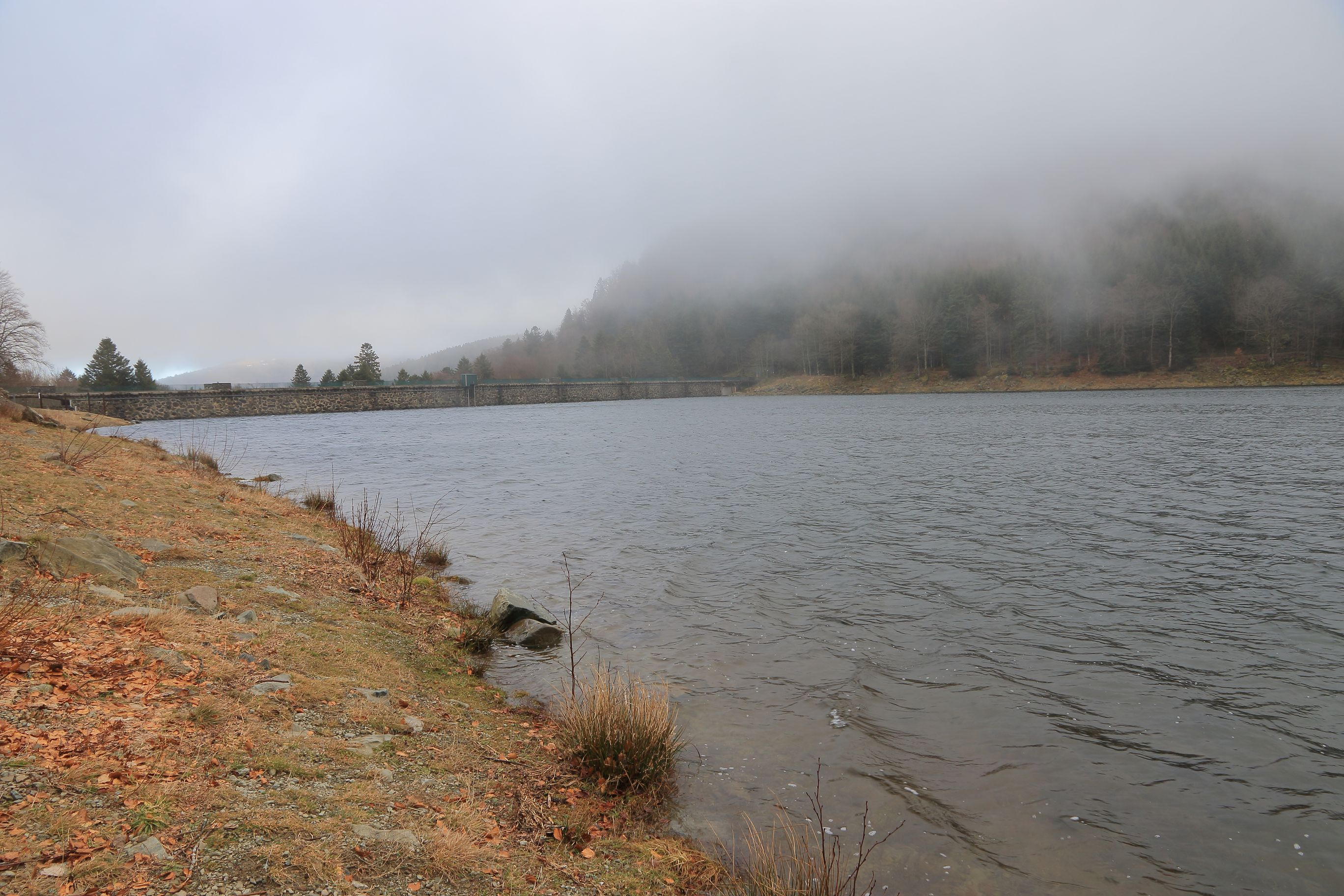 Les cascades s'écoulent a partir du déversoir du lac